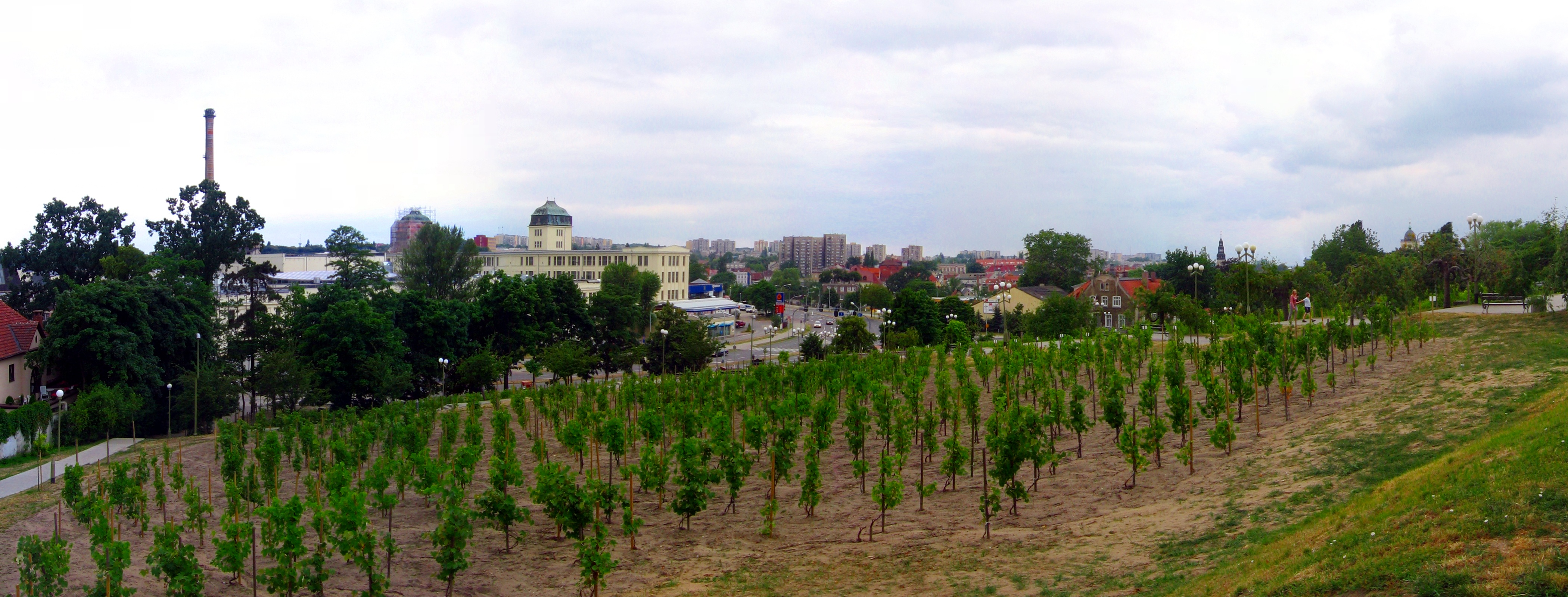 Winorośl na zboczu Wzgórza Winnego w Zielonej Górze; w tle żółte zabudowania (z wieżą) byłej fabryki wełny